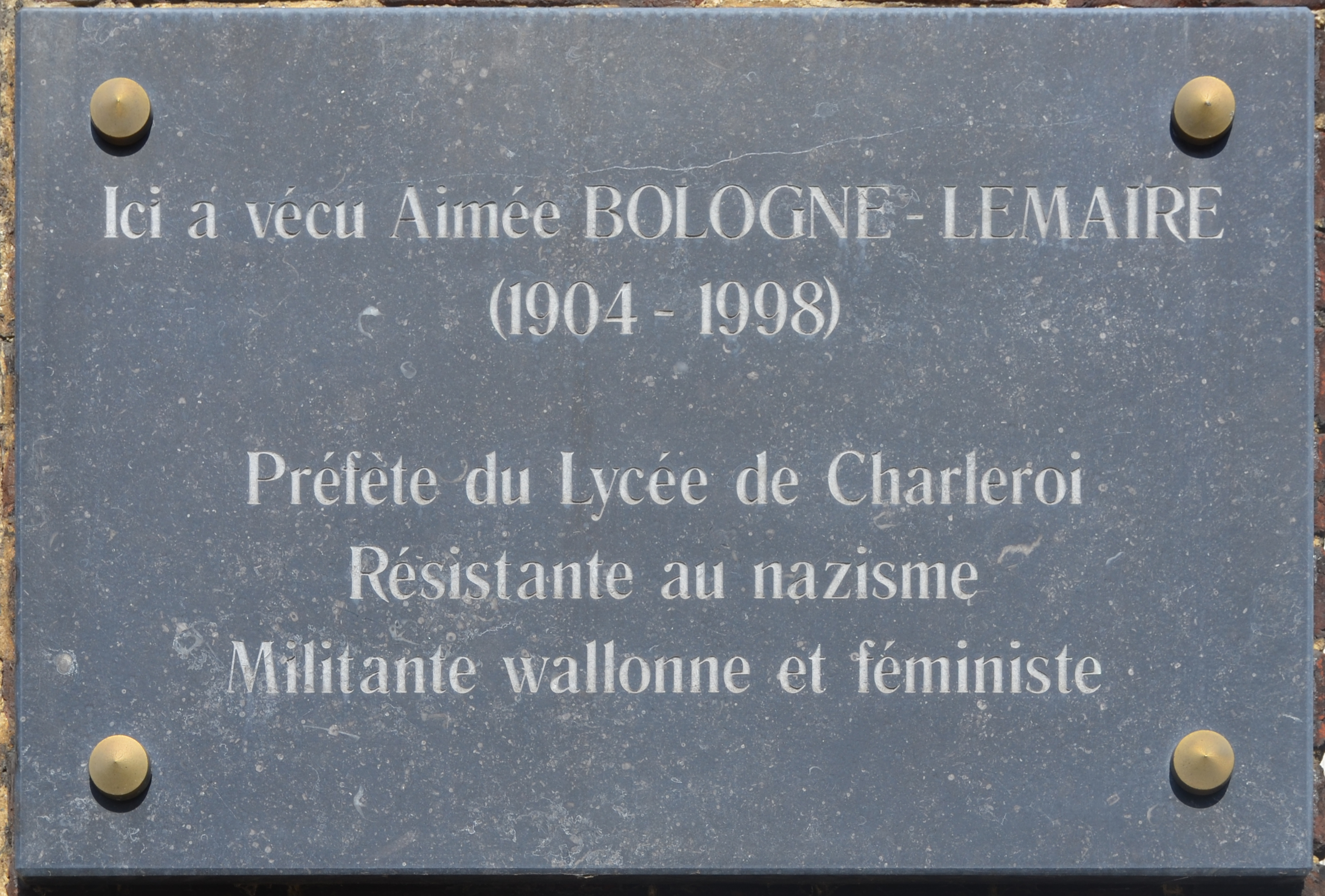 Plaque apposée à Charleroi (Belgique), rue Tumelaire, sur la façade de l'Athénée royal Vauban.Texte : Ici à vécu Aimée Bologne-Lemaire(1904-1998)Préfète du lycée de CharleroiRésistante au nazismeMilitante wallonne et féministe